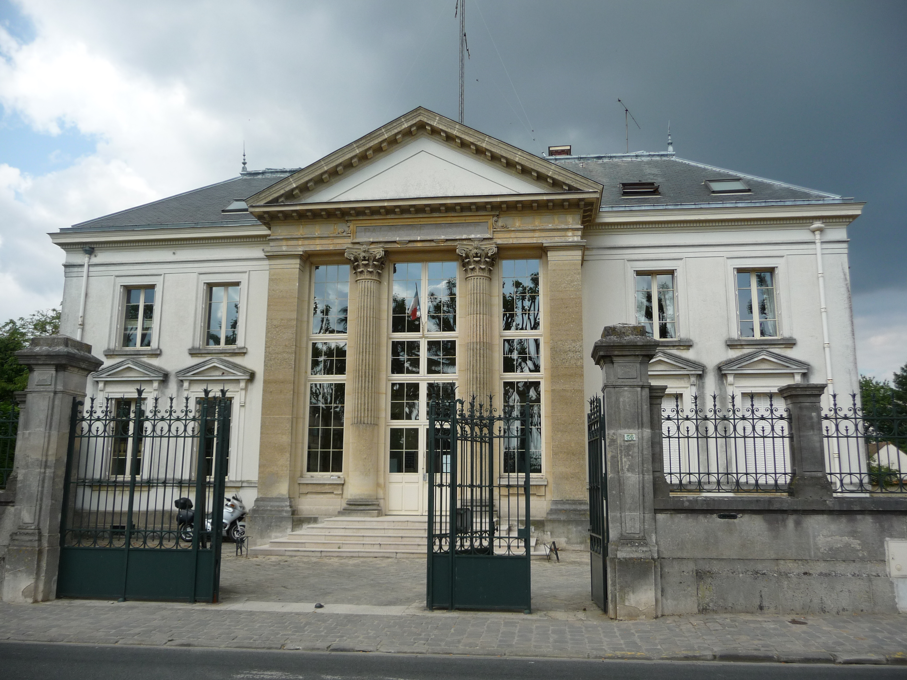 Photographie du Tribunal d'instance de Rambouillet.